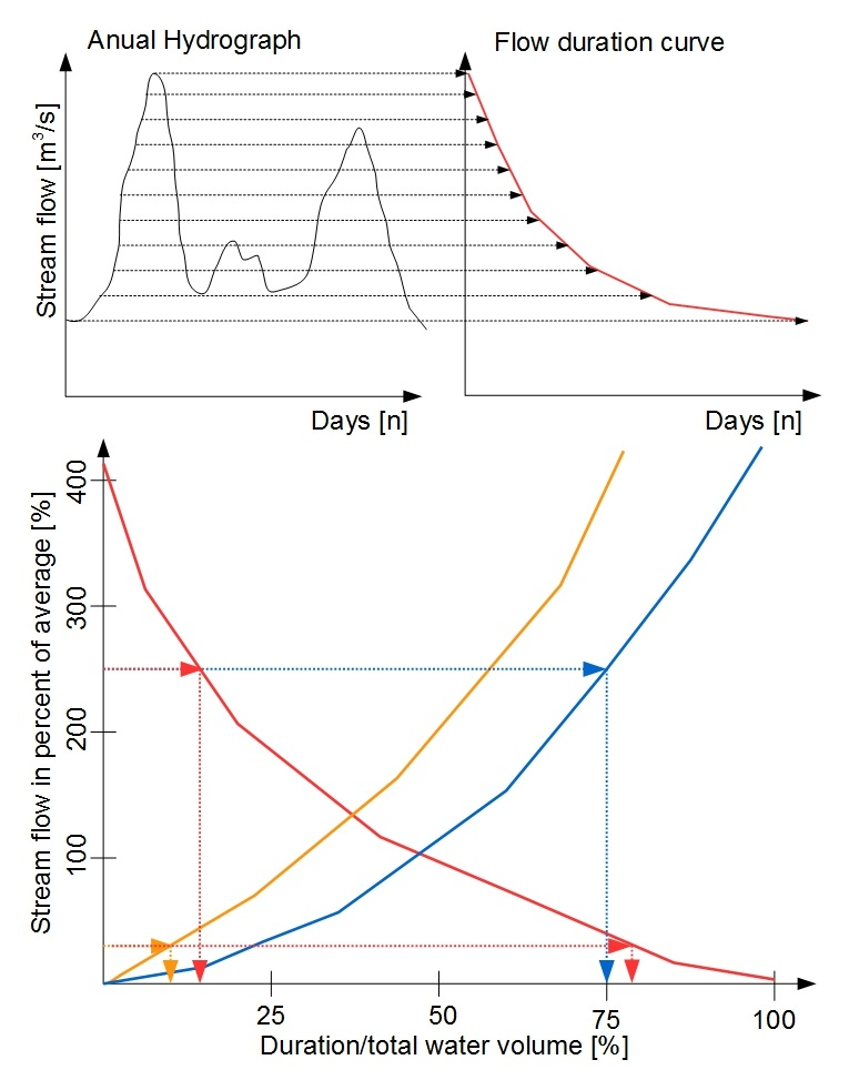 Construction of a flow duration curve and related correlations for dimensioning a power station.